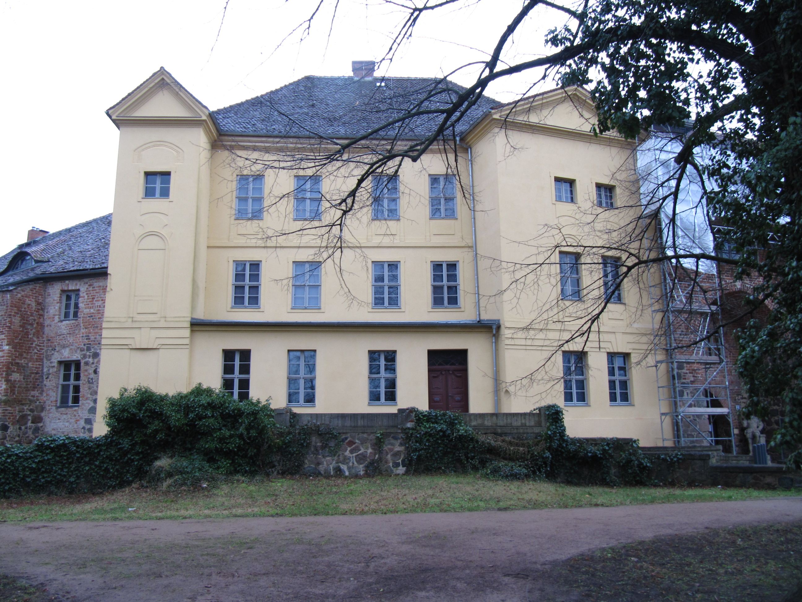 palas burg ziesar von außen